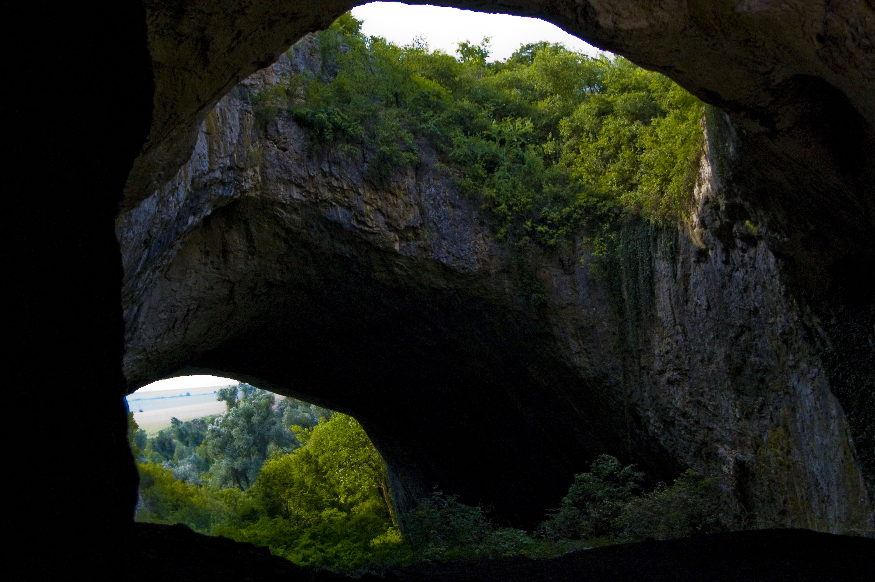 Деветашка пещера